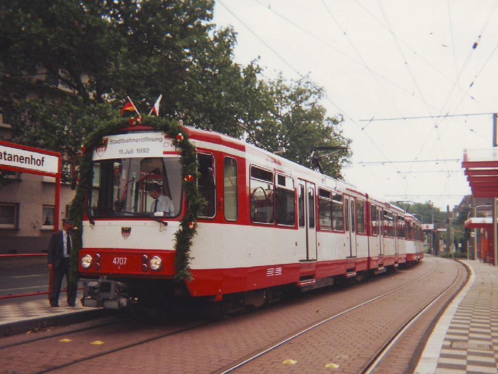 B-Wagendoppeltraktion der DVG am Tag der Stadtbahneröffnung am 11. Juli 1992 an der Haltestelle Platanenhof